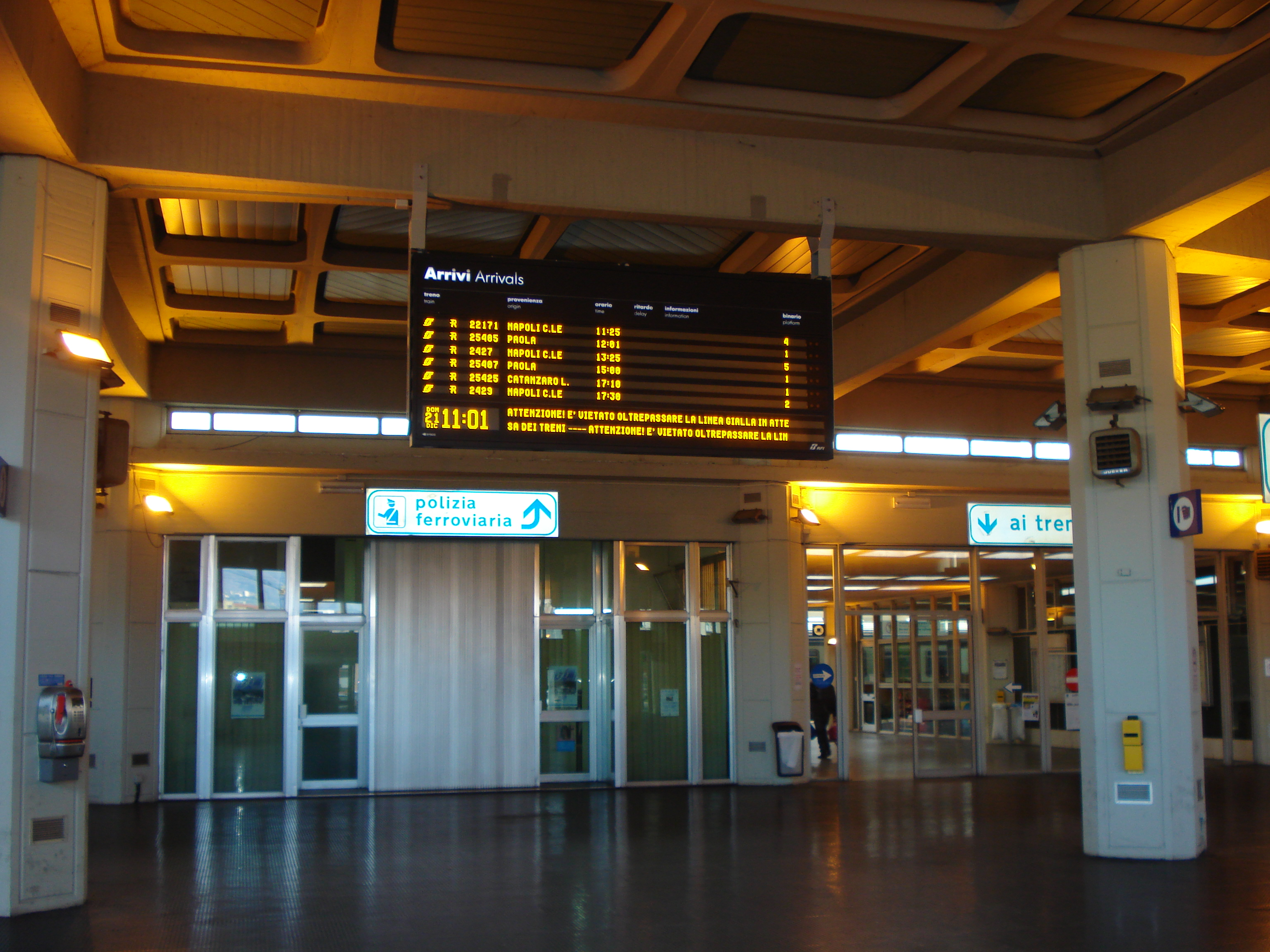 INTERNO DELLA STAZIONE FERROVIARIA DI VAGLIO LISE A COSENZA